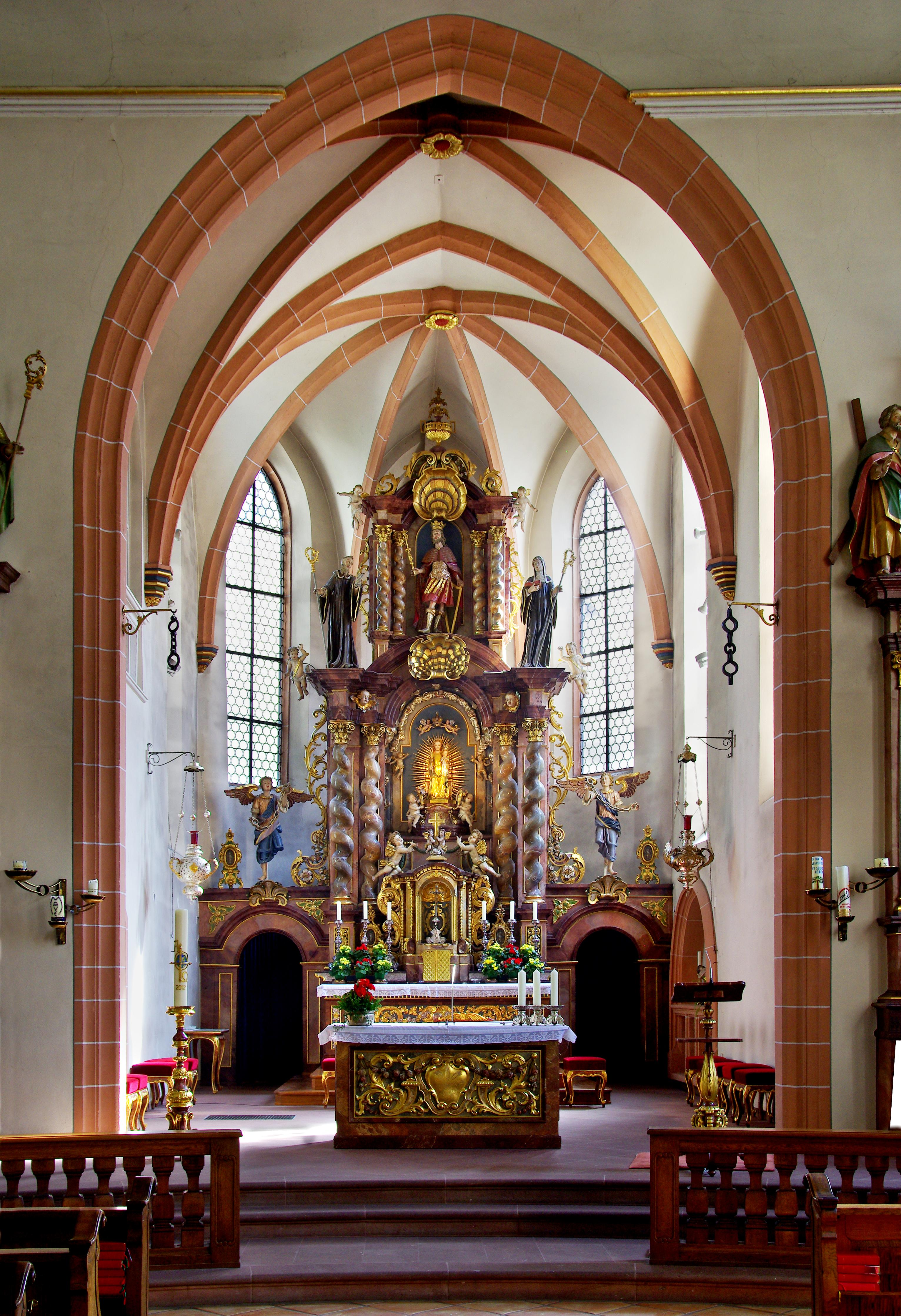 Wallfahrtskirche - Maria zu den Ketten in Zell am Harmersbach Blick auf den Hochaltar